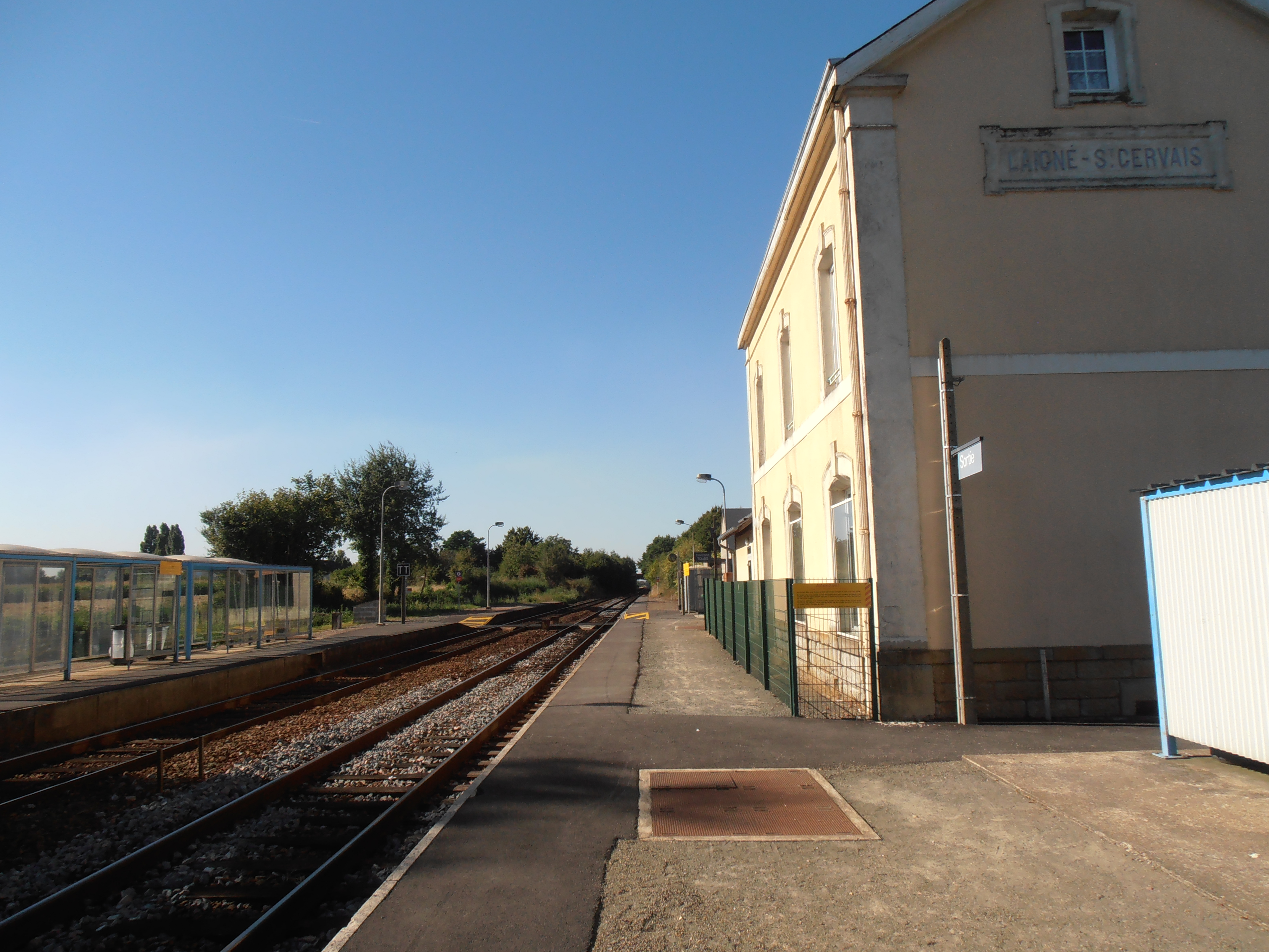 Le bâtiment et les voies en direction de Tours.